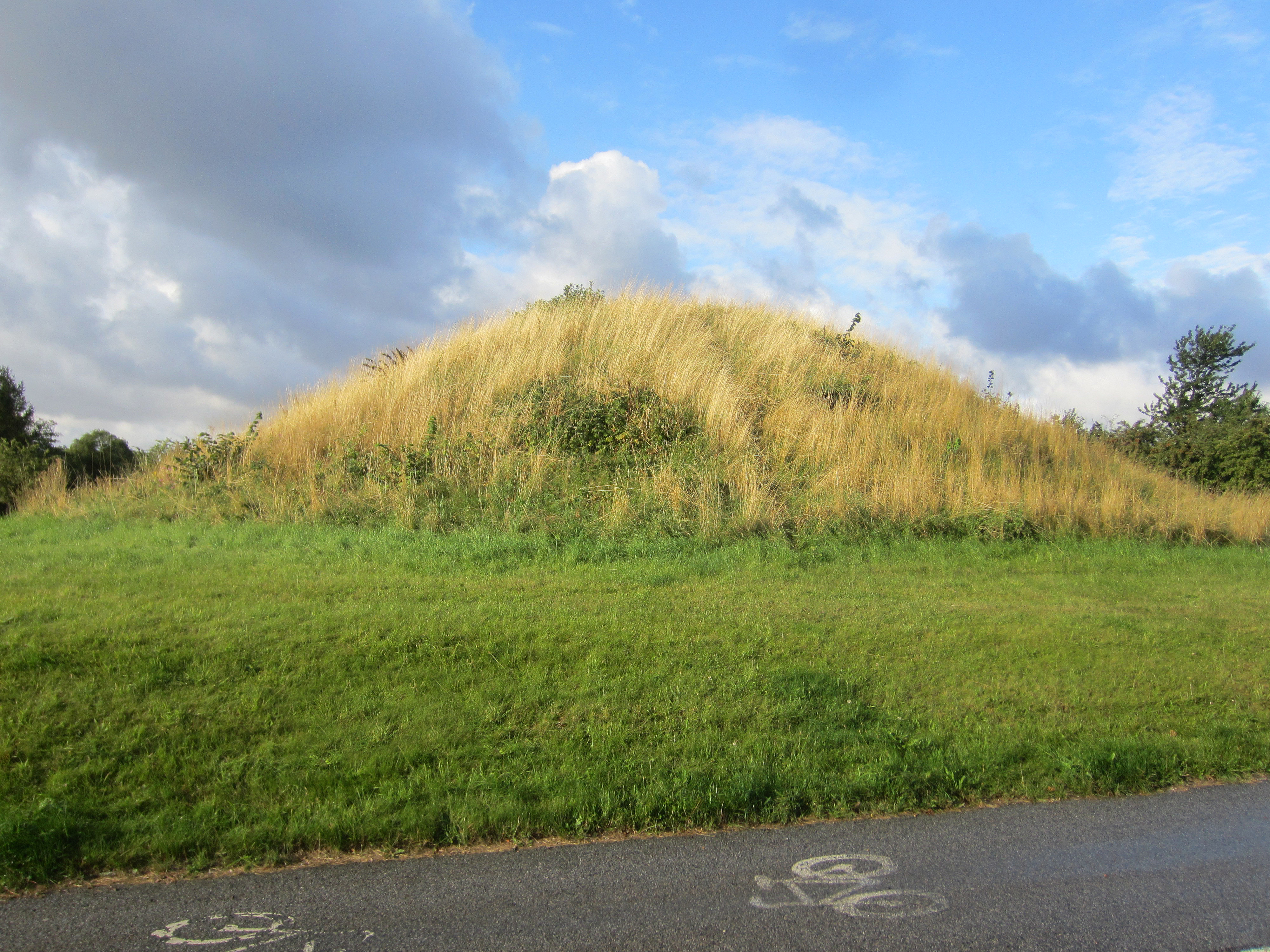 Bronsåldershögen Skäfehög i Malmö, Sverige.